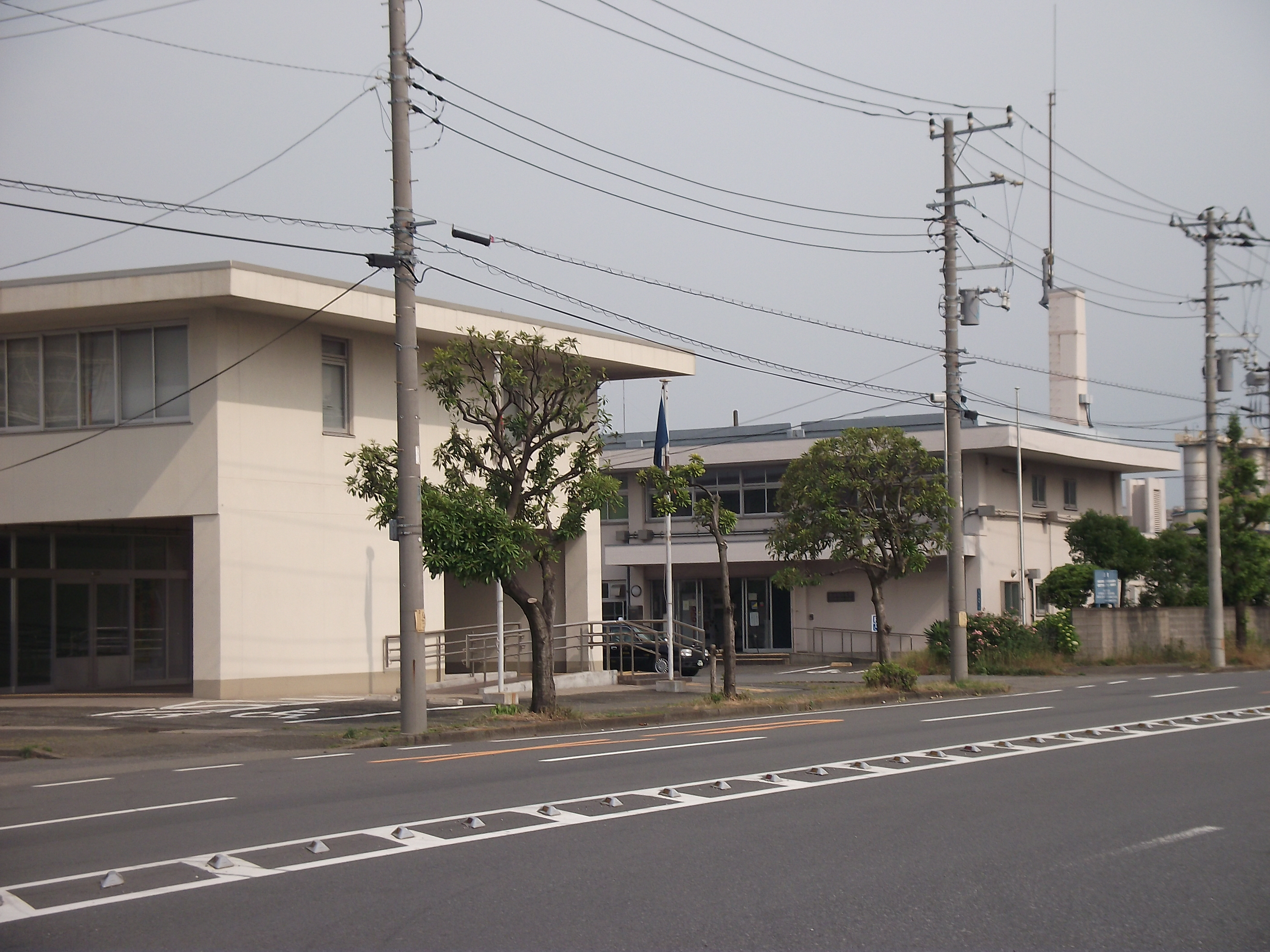 神奈川県川崎市川崎区千鳥町に所在する川崎港湾合同庁舎（手前）と横浜税関川崎税関支署（奥）。